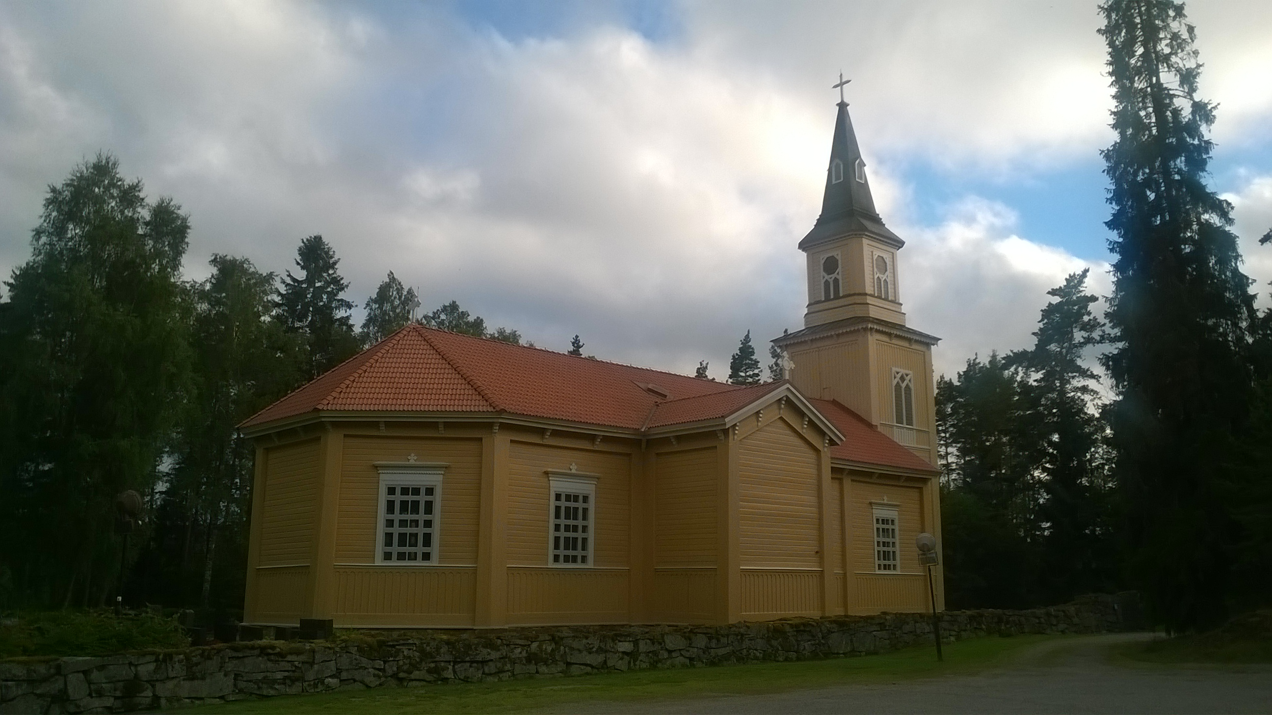 Karjalan kirkko, Mynämäki